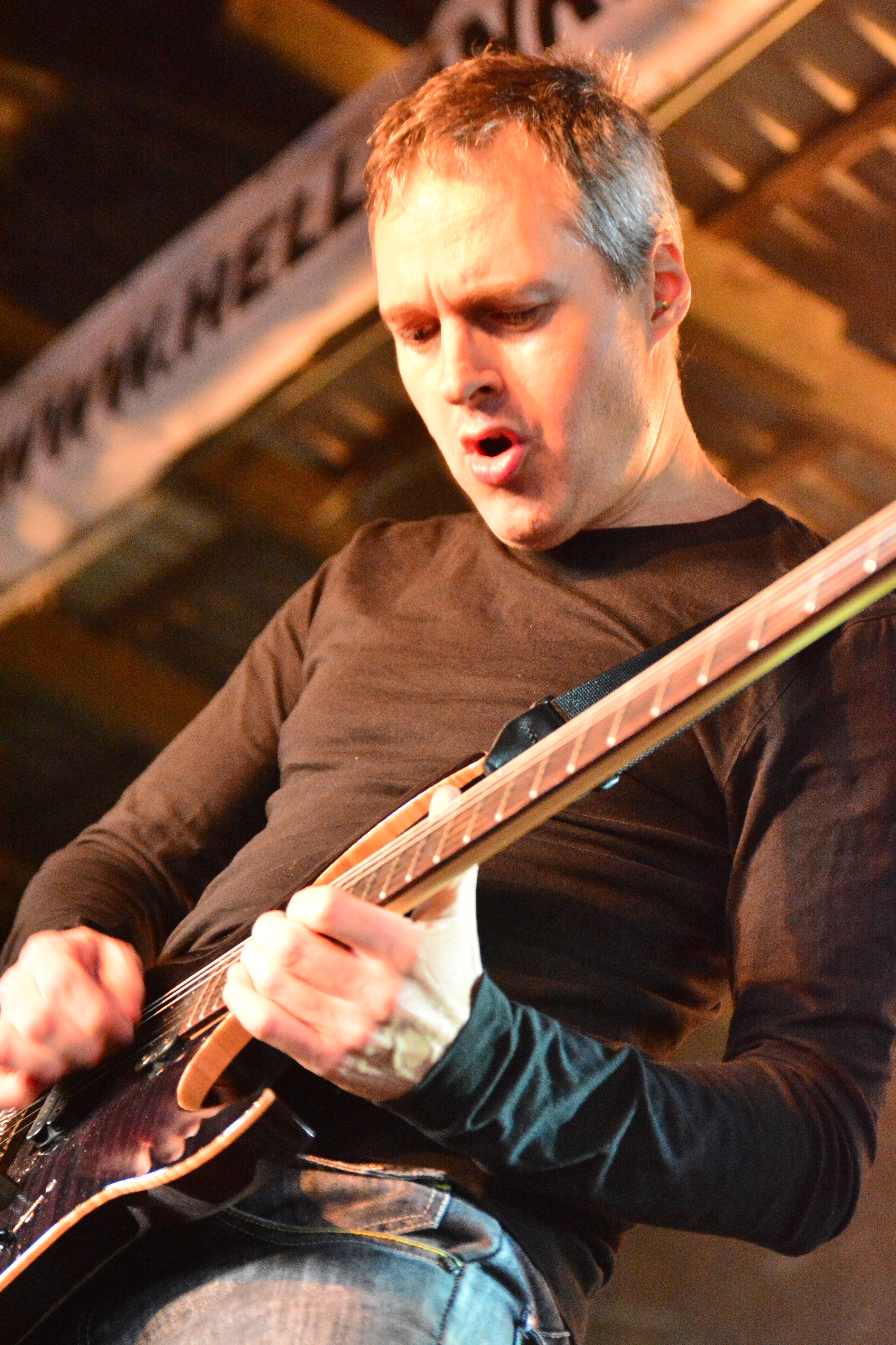 Threshold beim Headbangers Open Air 2015